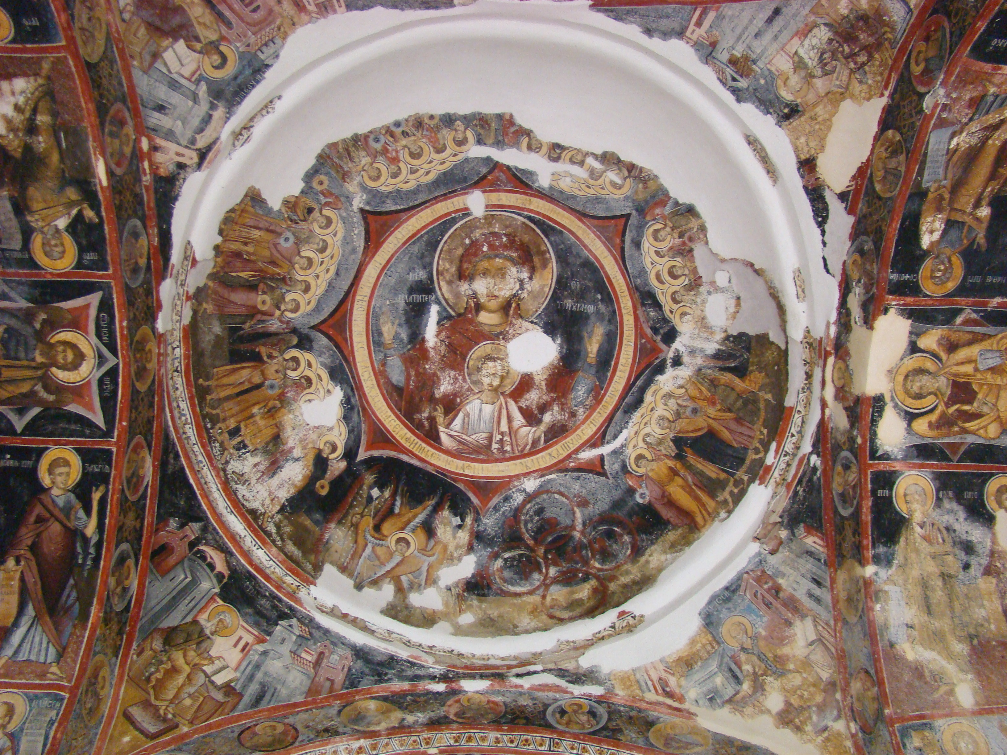 Bolnița „Adormirea Maicii Domnului”, Mănăstirea Hurezi, Vâlcea